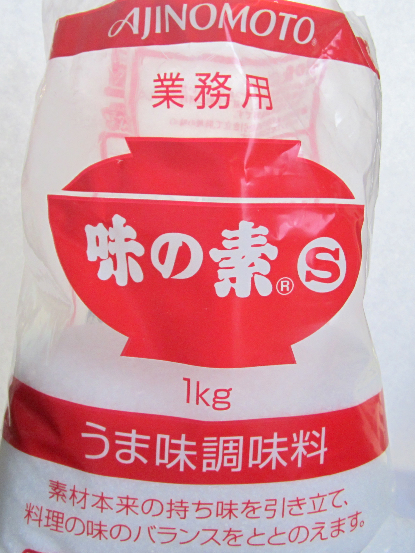 代表的な調味料である「味の素S（業務用）」